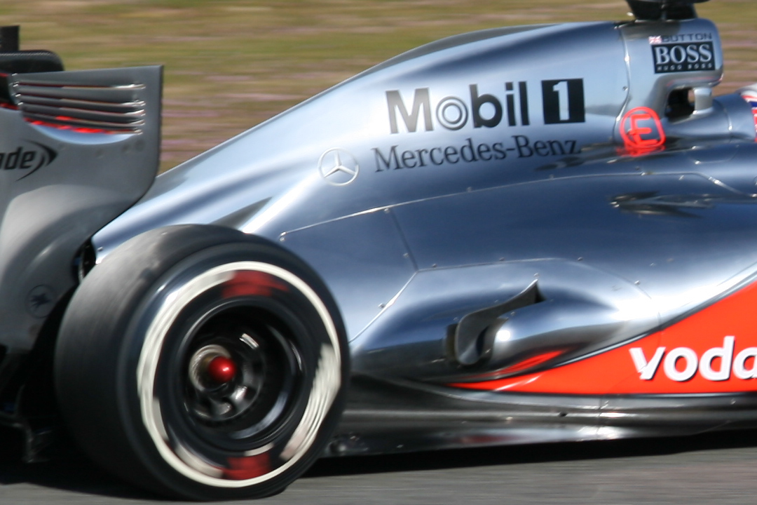 McLaren MP4-27 exhaust system